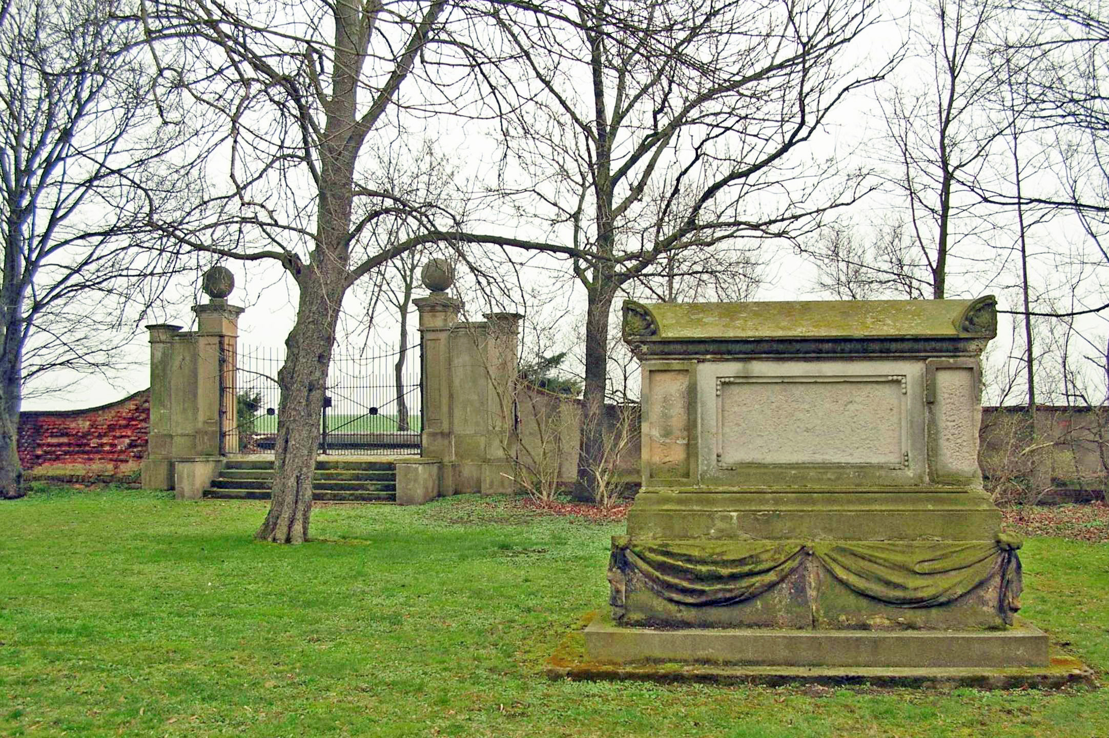 das von J.G. von Quandt für seine Mutter errichtetes Denkmal und Windmühlentor der Stadt Leipzig im Rittergutspark Wachau